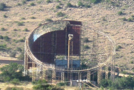 Արև կայան